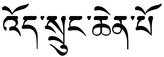 Махакашьяпа